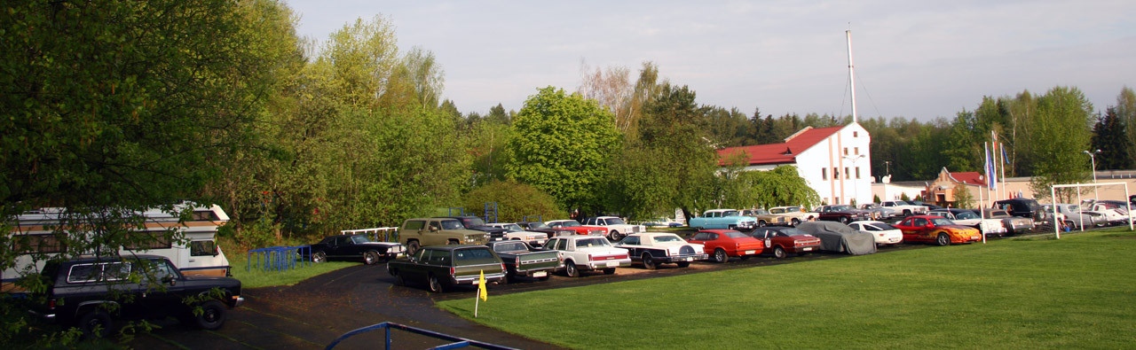 Ретро-Минск 2012